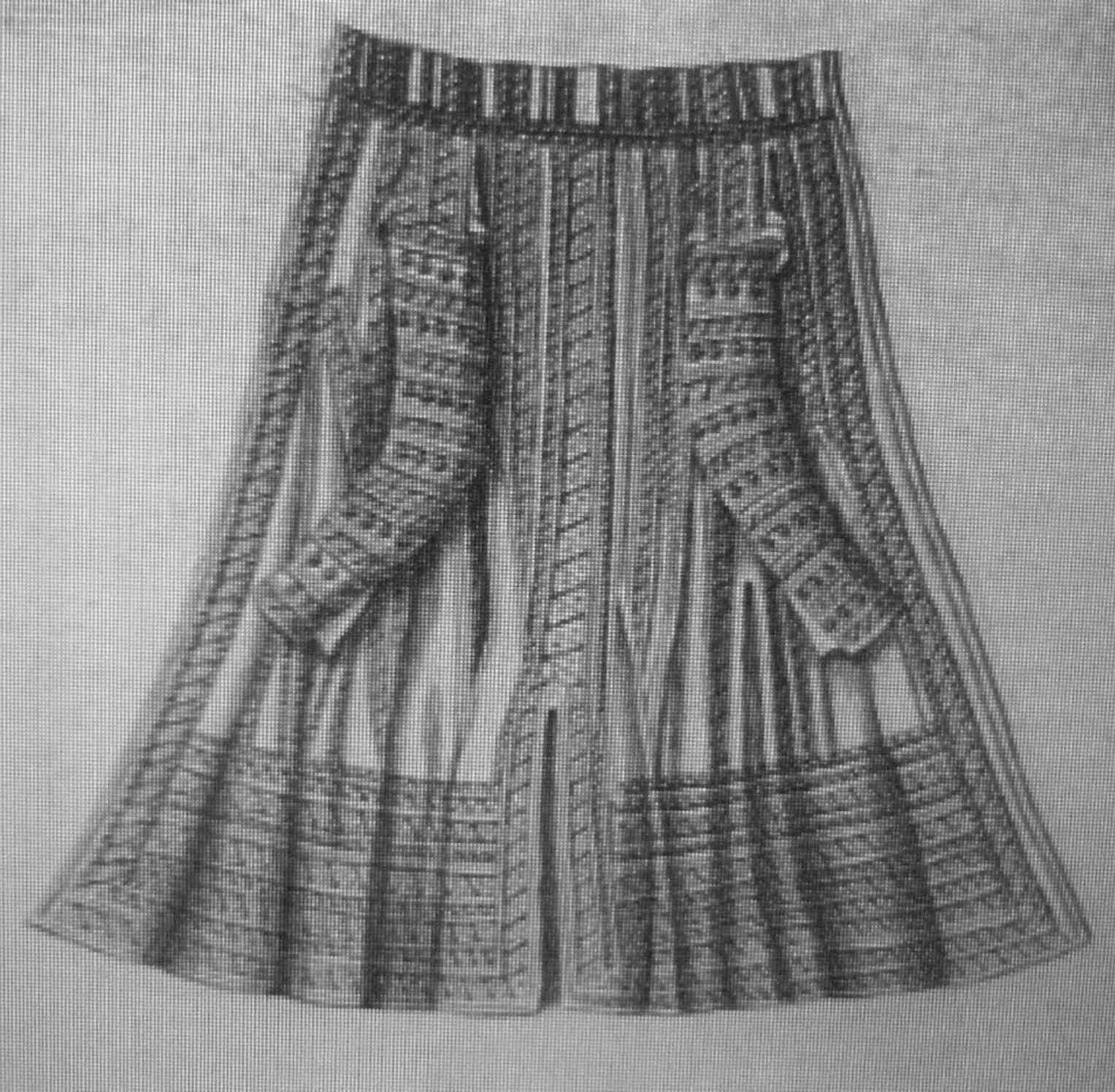 Habit du guidon de la Compagnie de la mère folle de Dijon, de velours vert galonné d'Argent, les manches entièrement de velours rouge, galonnées de même avec des grelots entre la distance des galons, dessiné au XVIIe siècle d'après l'original qui était entre les mains de l'abbé Gillet. Reproduit d'après : Cérémonies et coutumes religieuses de tous les peuples du monde, représentées par des figures dessinées à la main de Bernard Picart, et autres ; avec des explications historiques et des dissertations curieuses., L. Prudhomme éditeur, Paris 1809, tome 8. Cette gravure date du XVIIème siècle.